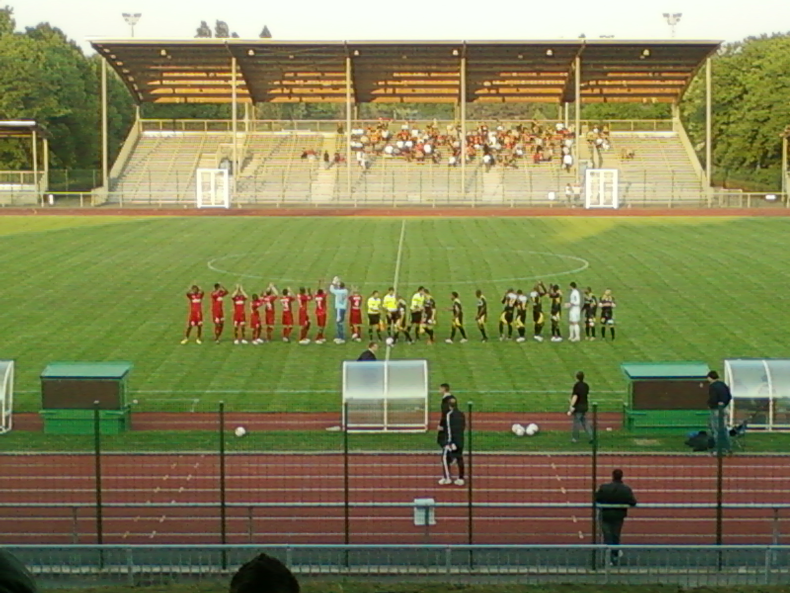 Présentation des équipes lors du match UJA - Guingamp du 22 avril 2011 au stade Marville de la Courneuve